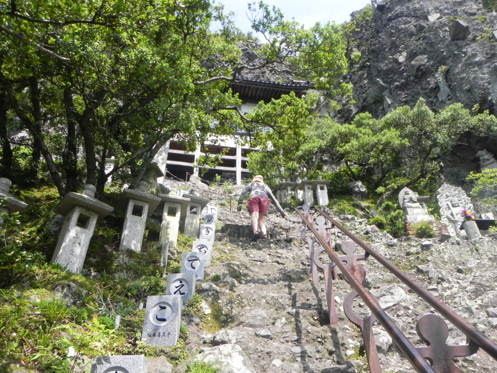 小豆島八十八箇所の72番.滝湖寺奥之院笠ヶ瀧の登り。